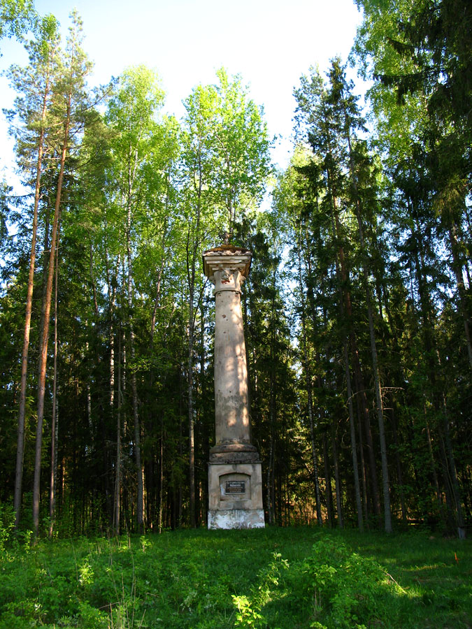 Беларуская (тарашкевіца): Лявонпаль